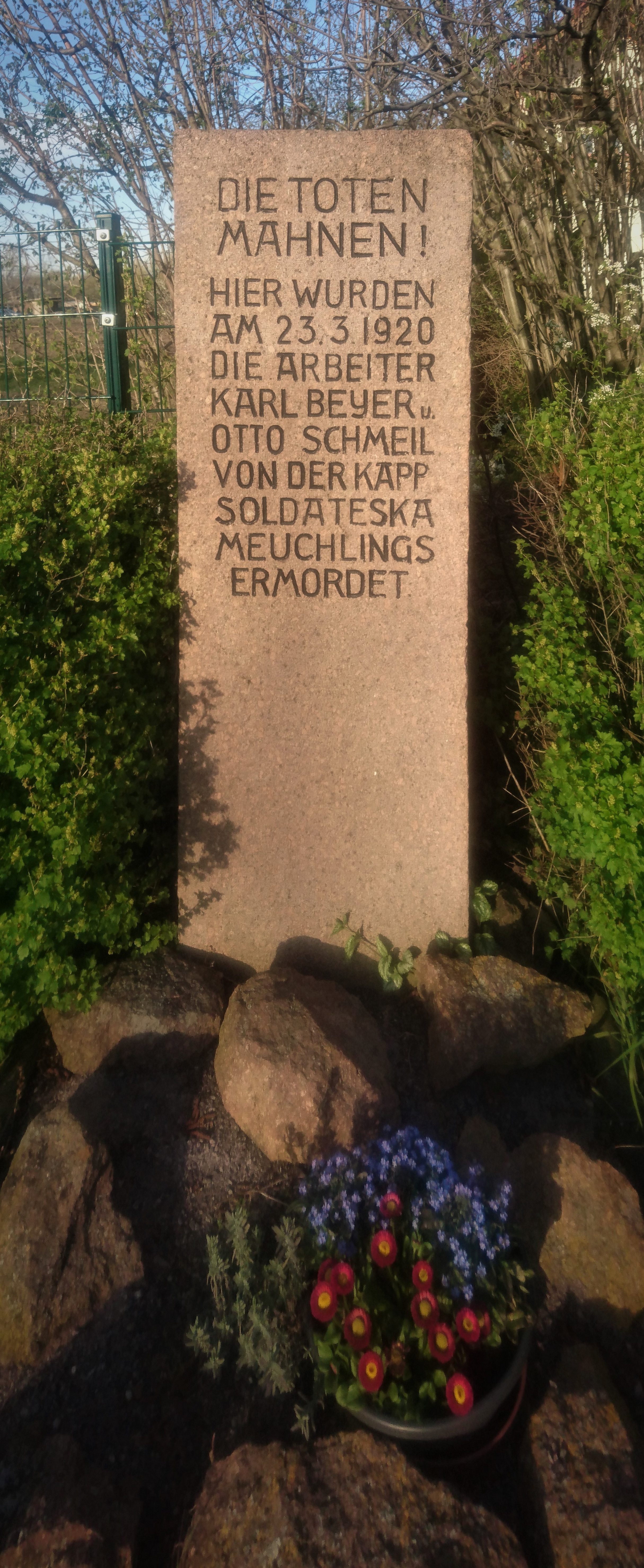 Gedenktafel Ortseingang Halle-Lettin, zur Erinnerung an die Opfer des Kapp-Putsches